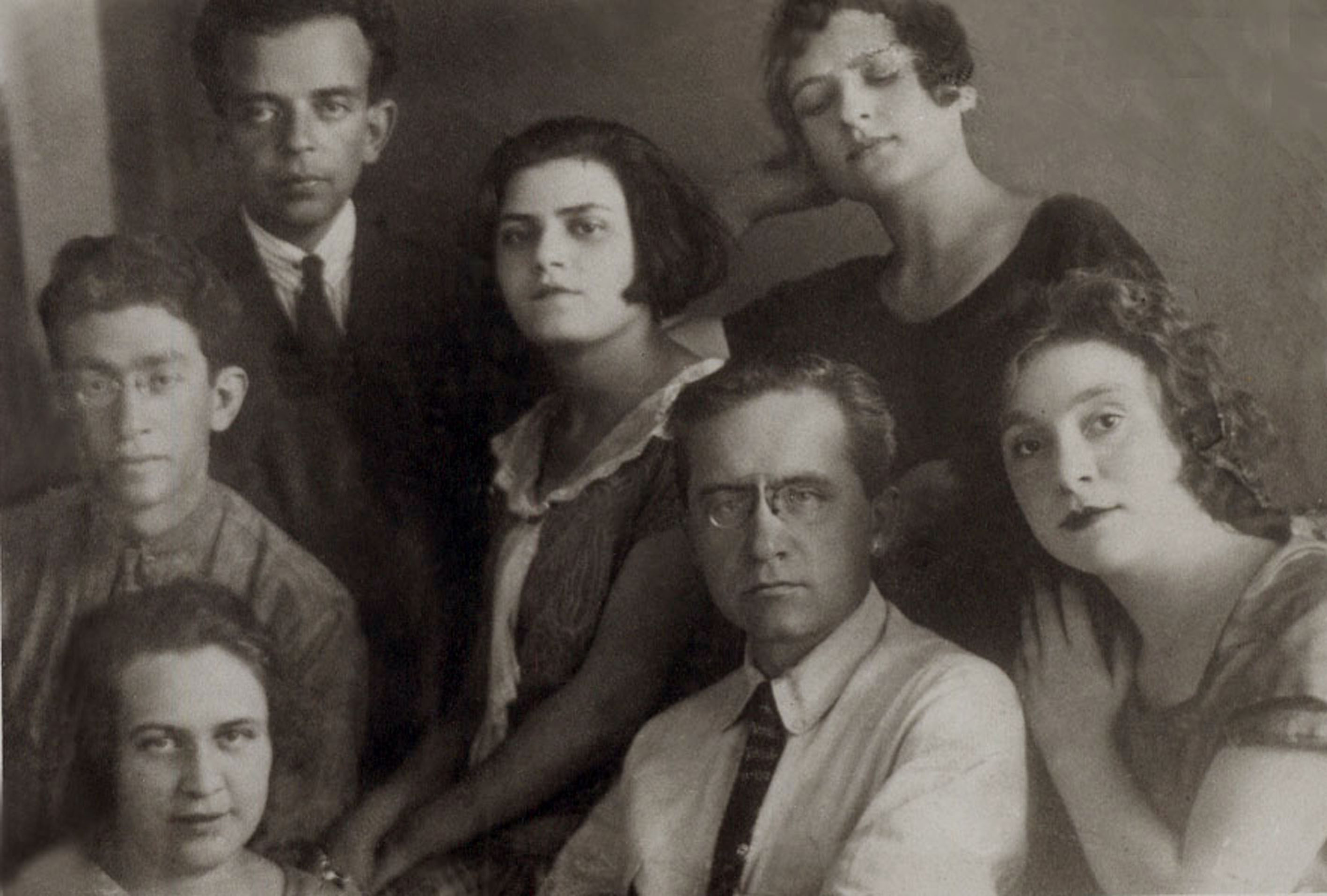 Семен Семенович Богатырёв - композитор,музыкальный теоретик со своими учениками Харьковской консерватории по классу инструментовки:слева направо - Е.Адливанкина,М.Полевский,В.Аркин,Г.Маречек,А.Лаврова-Щербинина,М.Итигина(позднее преподаватель по классу фортепиано Владимира Крайнева).Из семейного архива автора реконструкции фотографии,сына А.П.Лавровой-Щербининой.